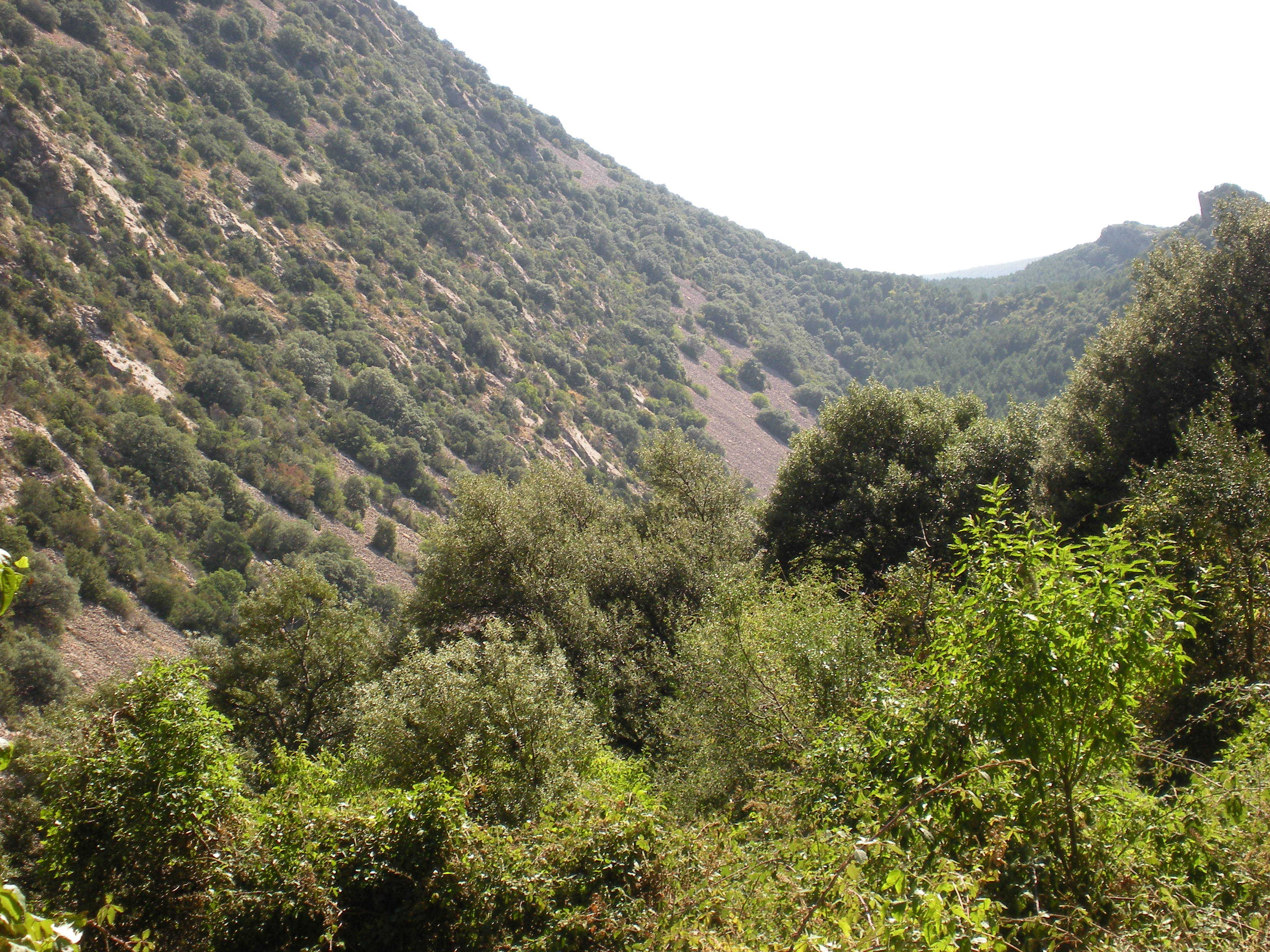 Paso hacia ermita de San Martín de la Bal d'Onsera